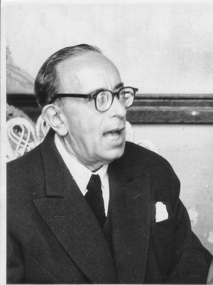 Foto de Adolfo Salazar